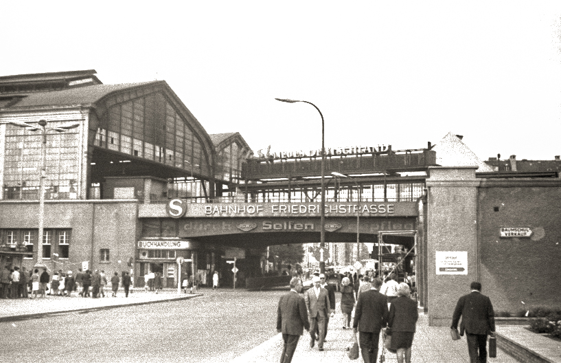 East Berlin view in 1967